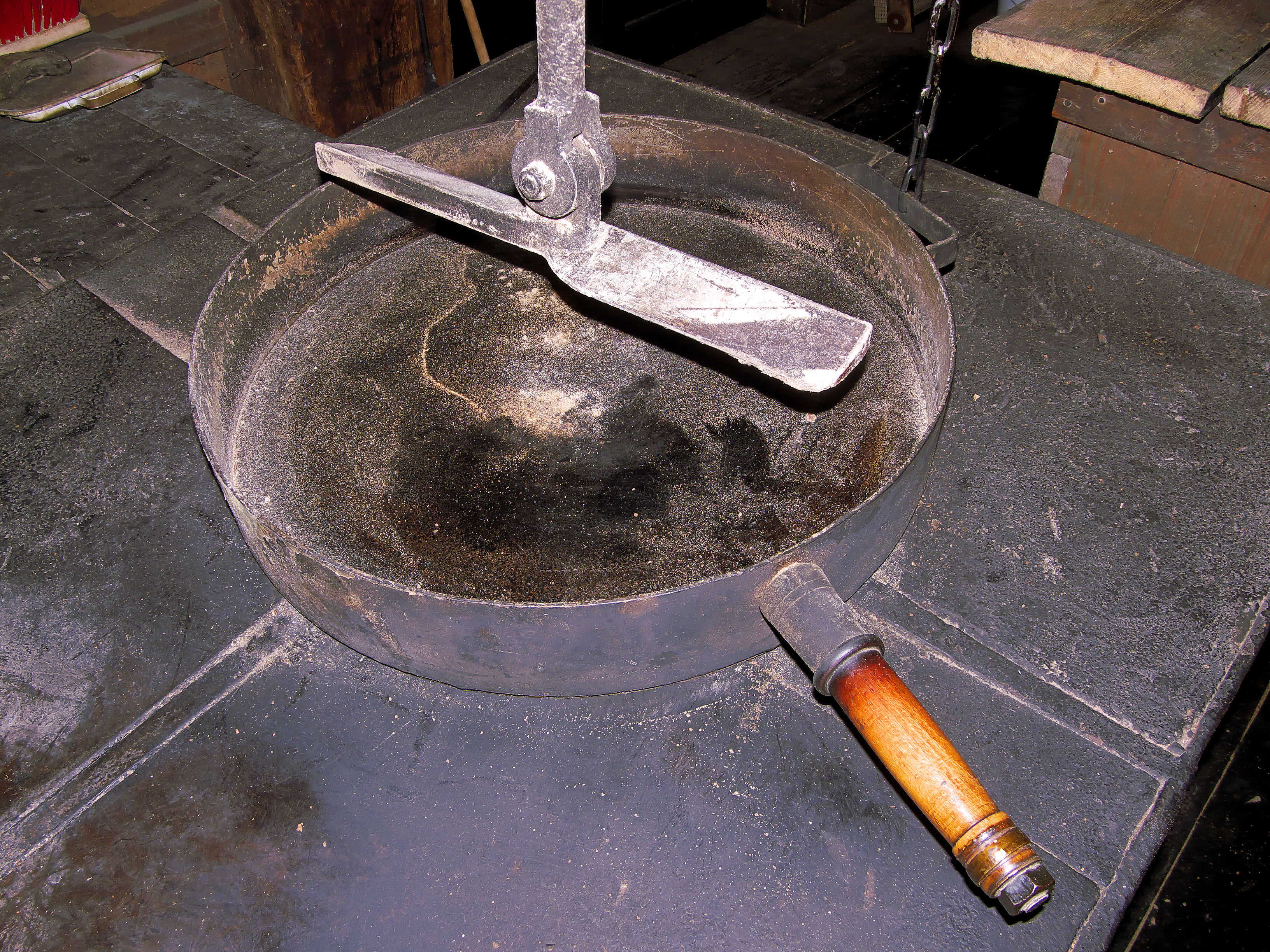 Molen De Passiebloem vuisterpan naslag